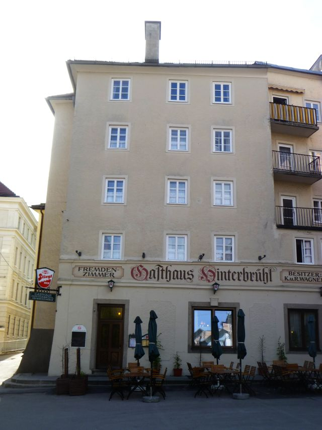 Bürgerhaus, Stab- und Glockengießerhaus